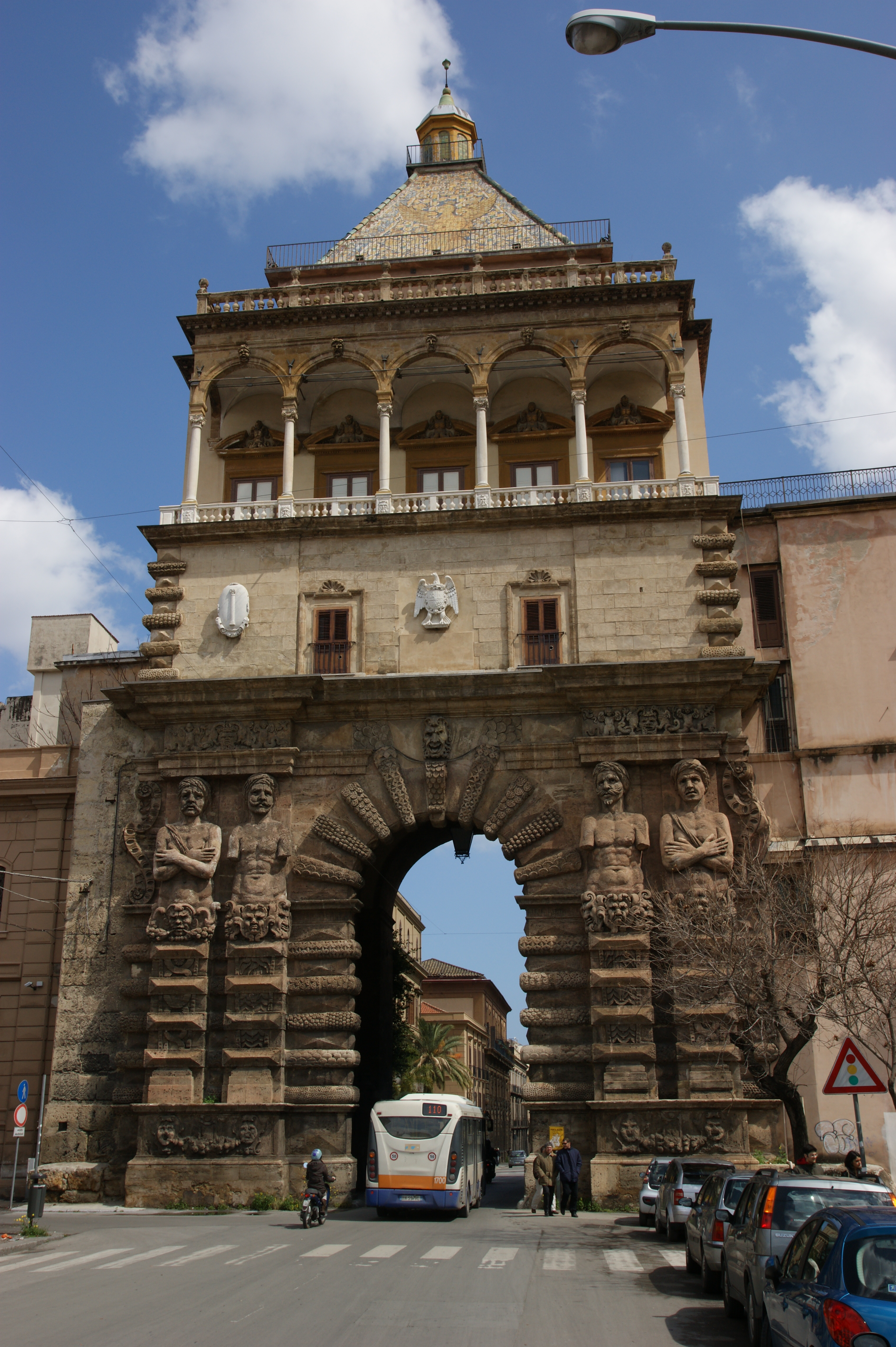 Brána Porta Nuova v Palermu na Sicílii. Úzkost průjezdu v bráně ukazuje těžce projíždějící autobus dole